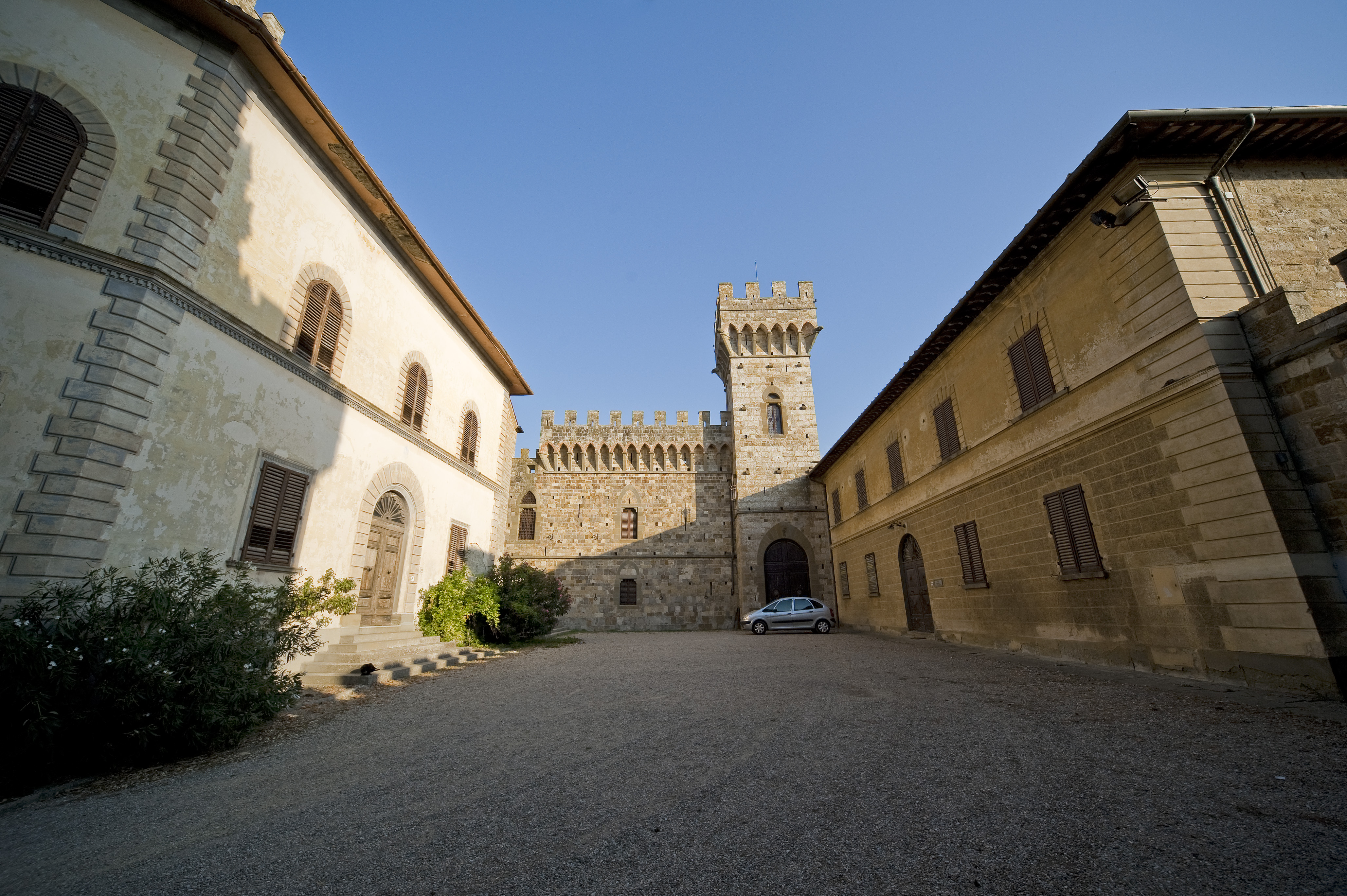 Piazzetta antistante la chiesa abbaziale di Badia a Passignano